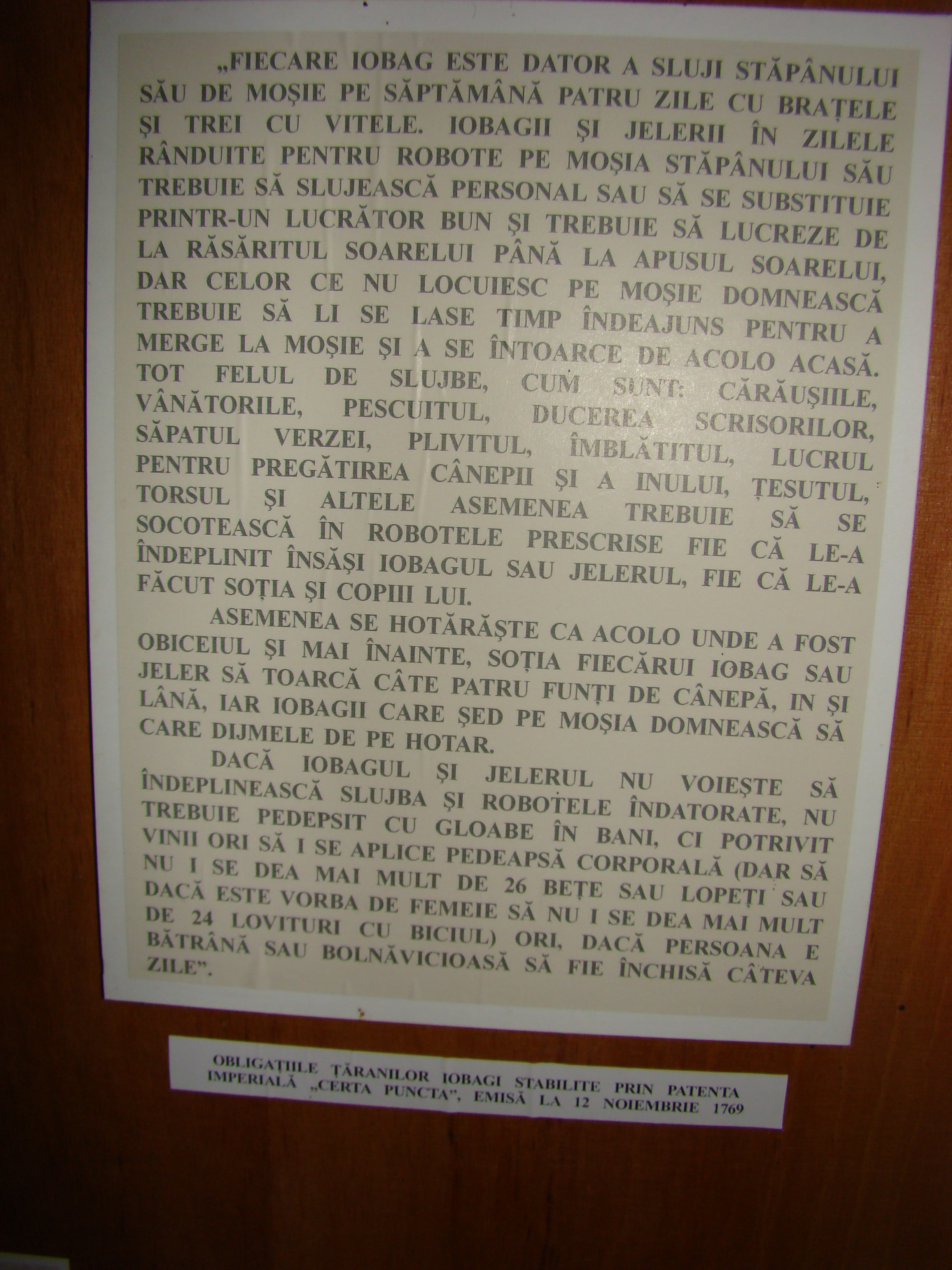 Casa natală Crişan (Marcu Giurgiu)